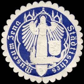 Sealing stamp Title: Städtisches Museum Jena Description: dunkelblau, weiß, geprägt Place: Jena size: 4 cm